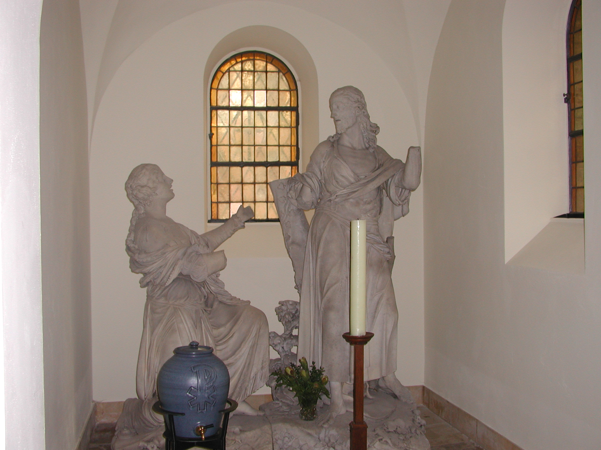 St. Marienkirche in Berlin-Karlshorst - Noli me tangere by Giovanni Marchiori